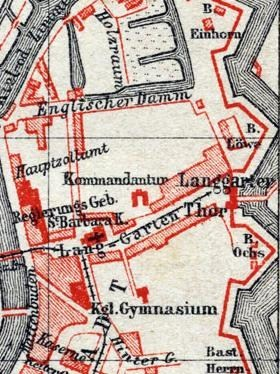 Gdańsk Długie Ogrody, Brama Żuławska z otoczeniem w 1885 roku.